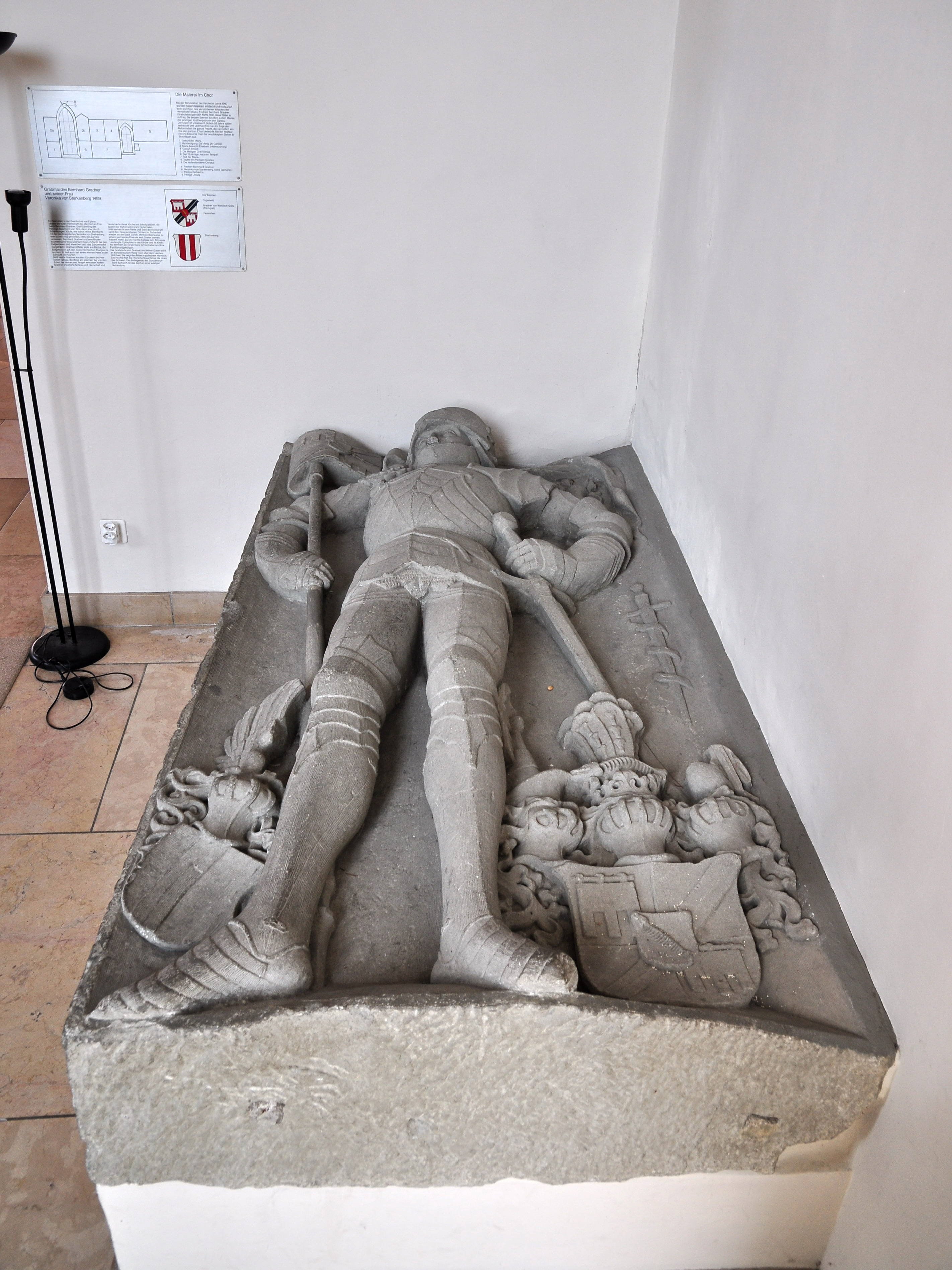 Reformierte Kirche, Chilengass in Eglisau (Switzerland) : Grabmal des Bernhard Gradner und seiner Frau Veronika von Starkenberg.